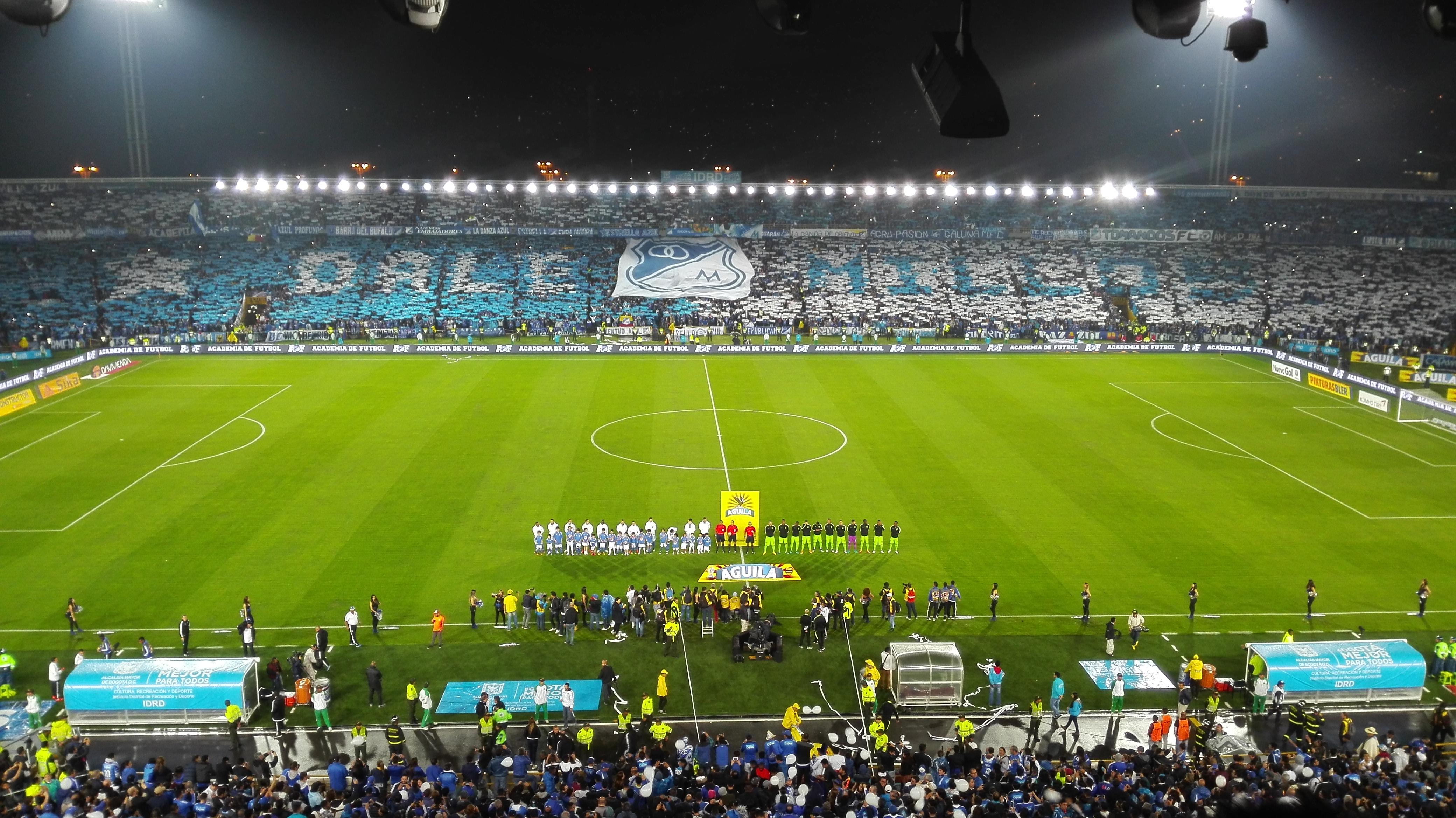 Acto protocolario en el estadio El Campín previo a un clásico entre Atlético Nacional y Millonarios.